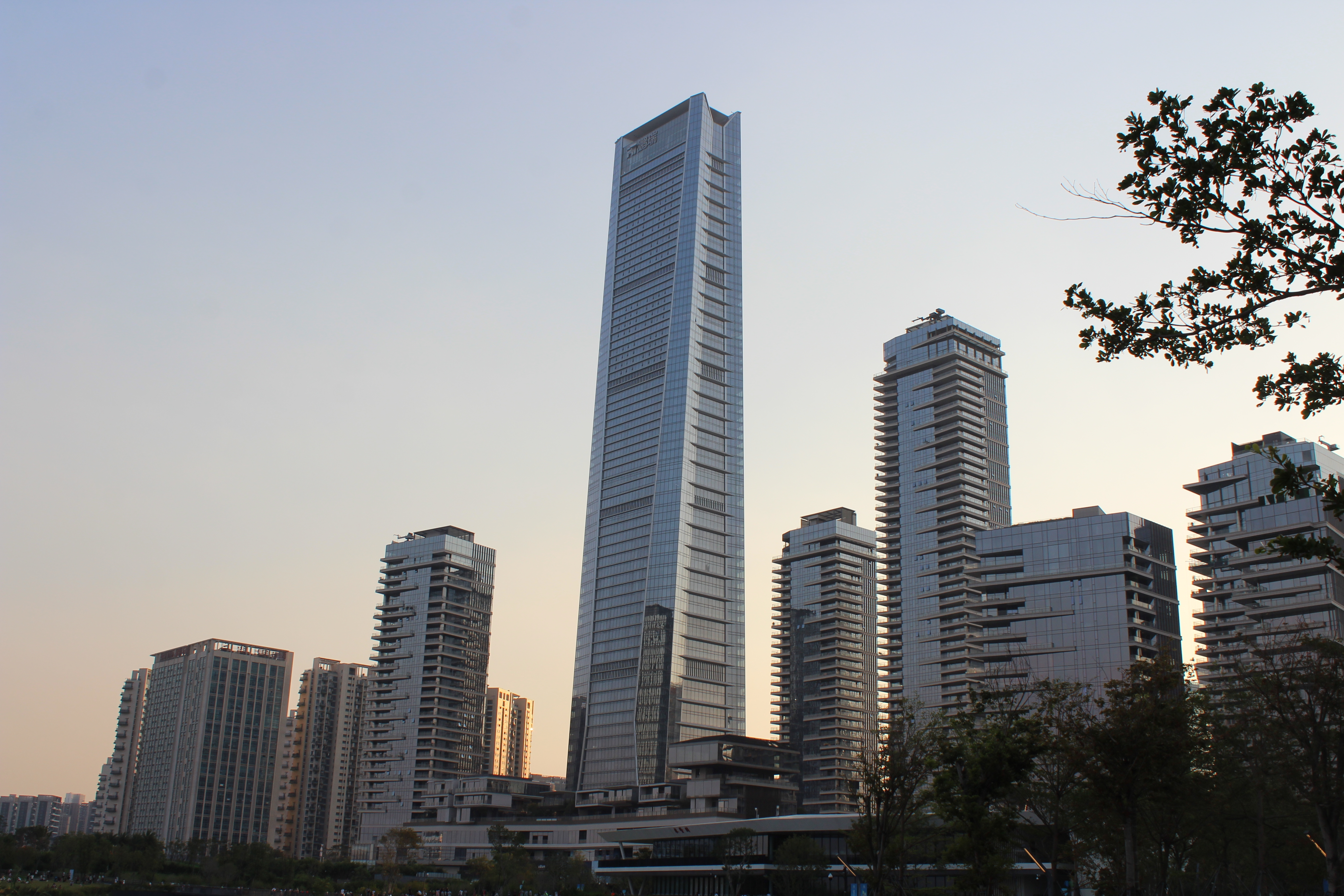 One Shenzhen Bay, le 03 octobre 2018 Shenzhen, Guangdong, China